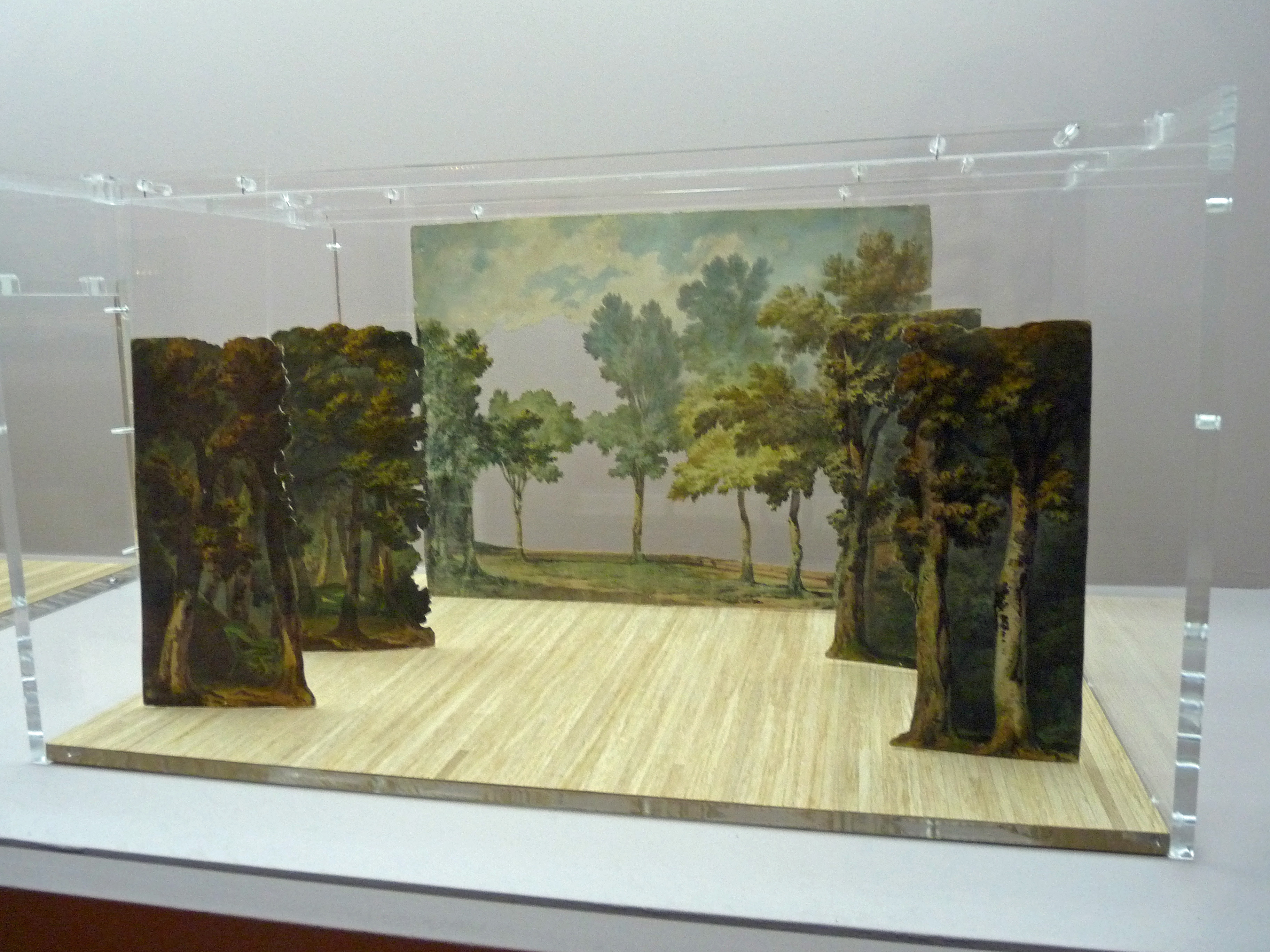 Philippe-Jacques de Loutherbourg, Les Jardins de Kensington, maquette de décor de théâtre, Victoria and Albert Museum, Theatre and Performance (exposition Loutherbourg : tourments et chimères au Musée des beaux-arts de Strasbourg)